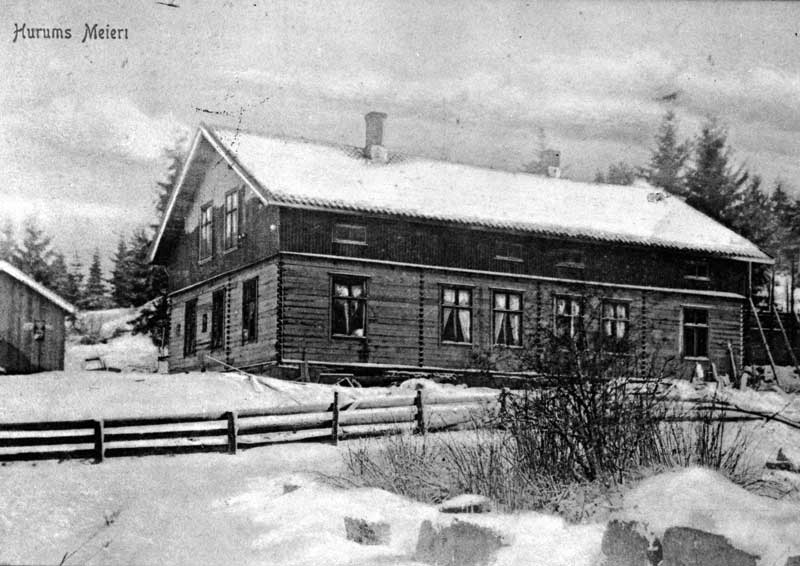 Hurum meieri 1919